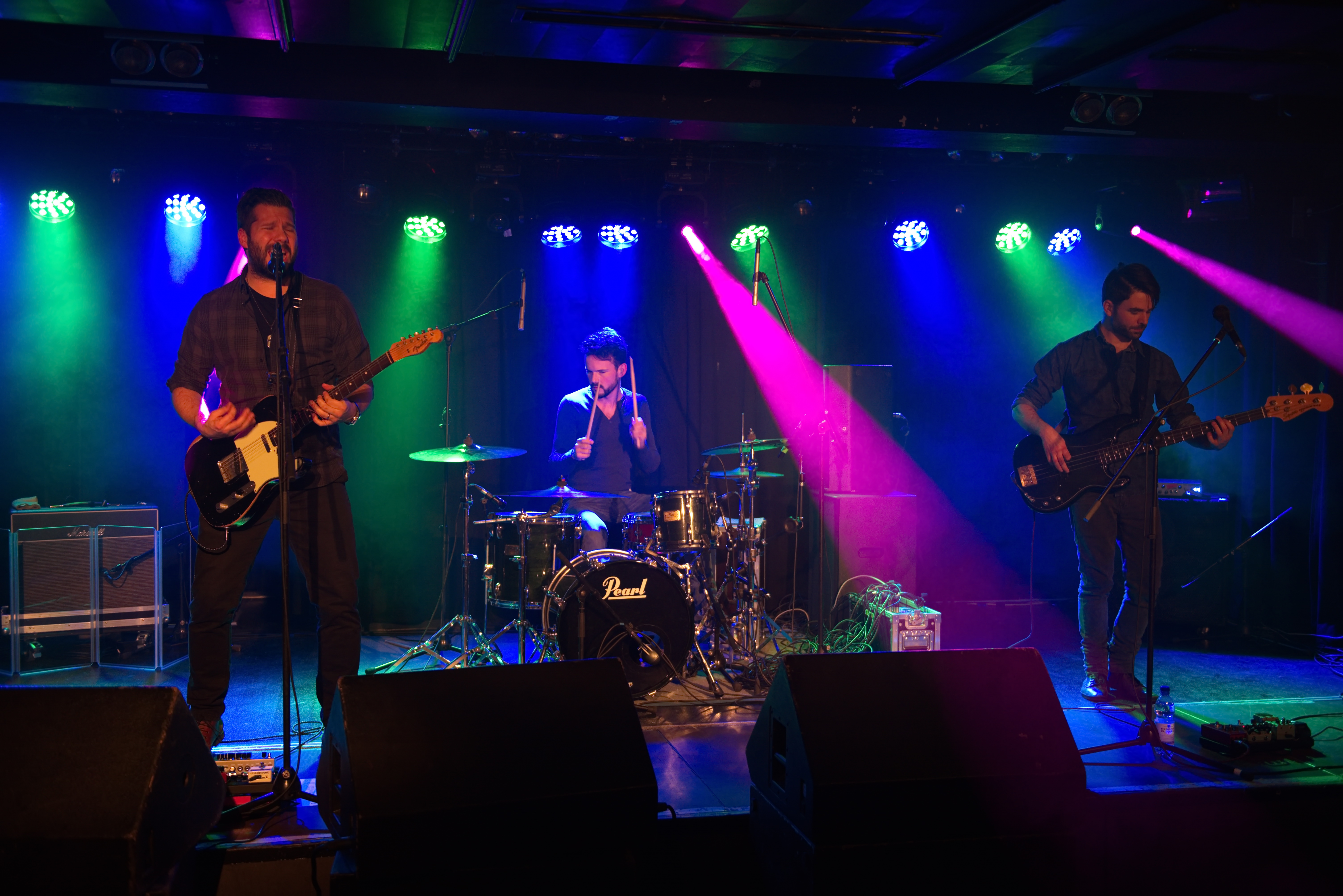 Kris Pohlmnann am 22. Januar 2016 im Live Club Barmen in Wuppertal